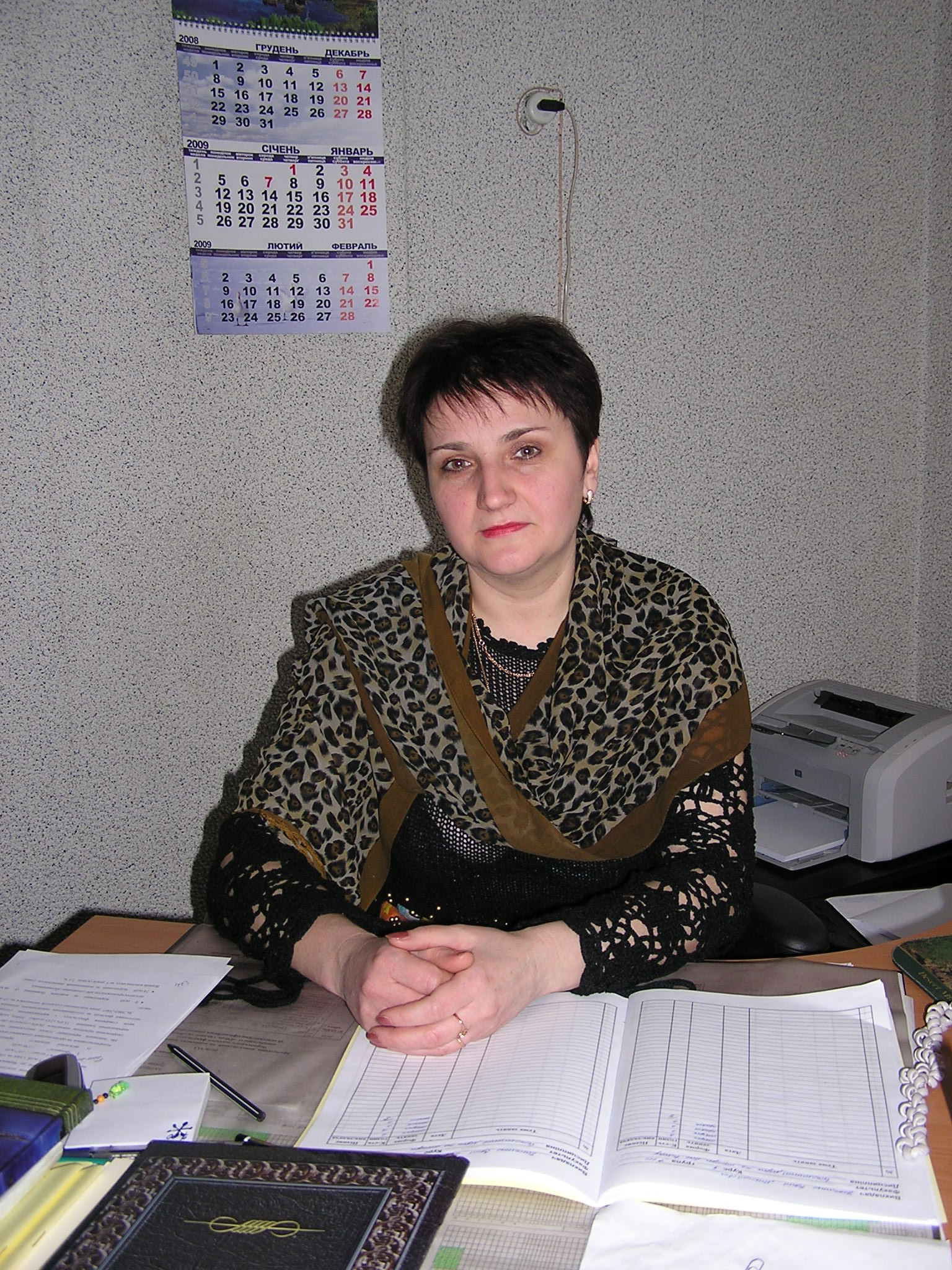 Гасюк Лариса Миколаївна - директор філія «Черкаський кооперативний економіко-правовий коледж» Вищого навчального закладу Укоопспілки «Полтавський університет економіки і торгівлі»